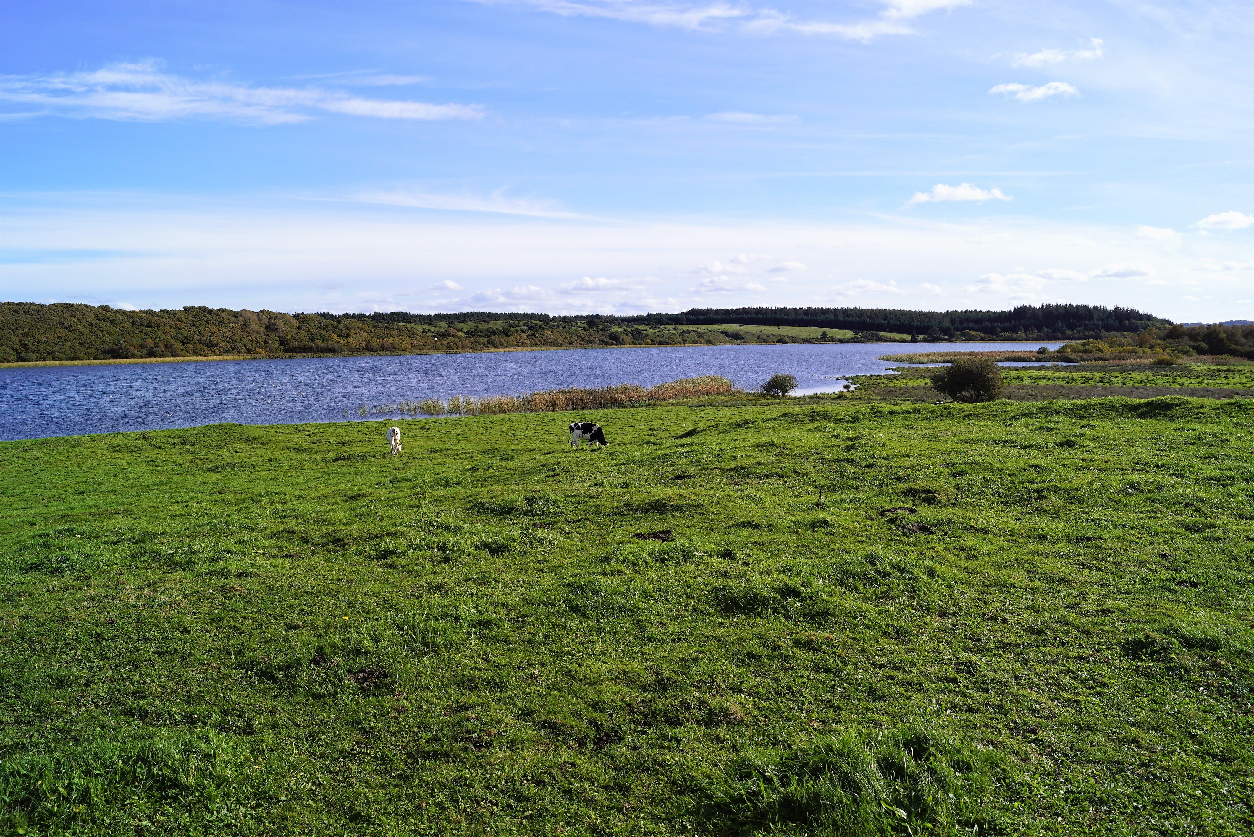 Stubbergård Sø set mod syd fra Stubberkloster